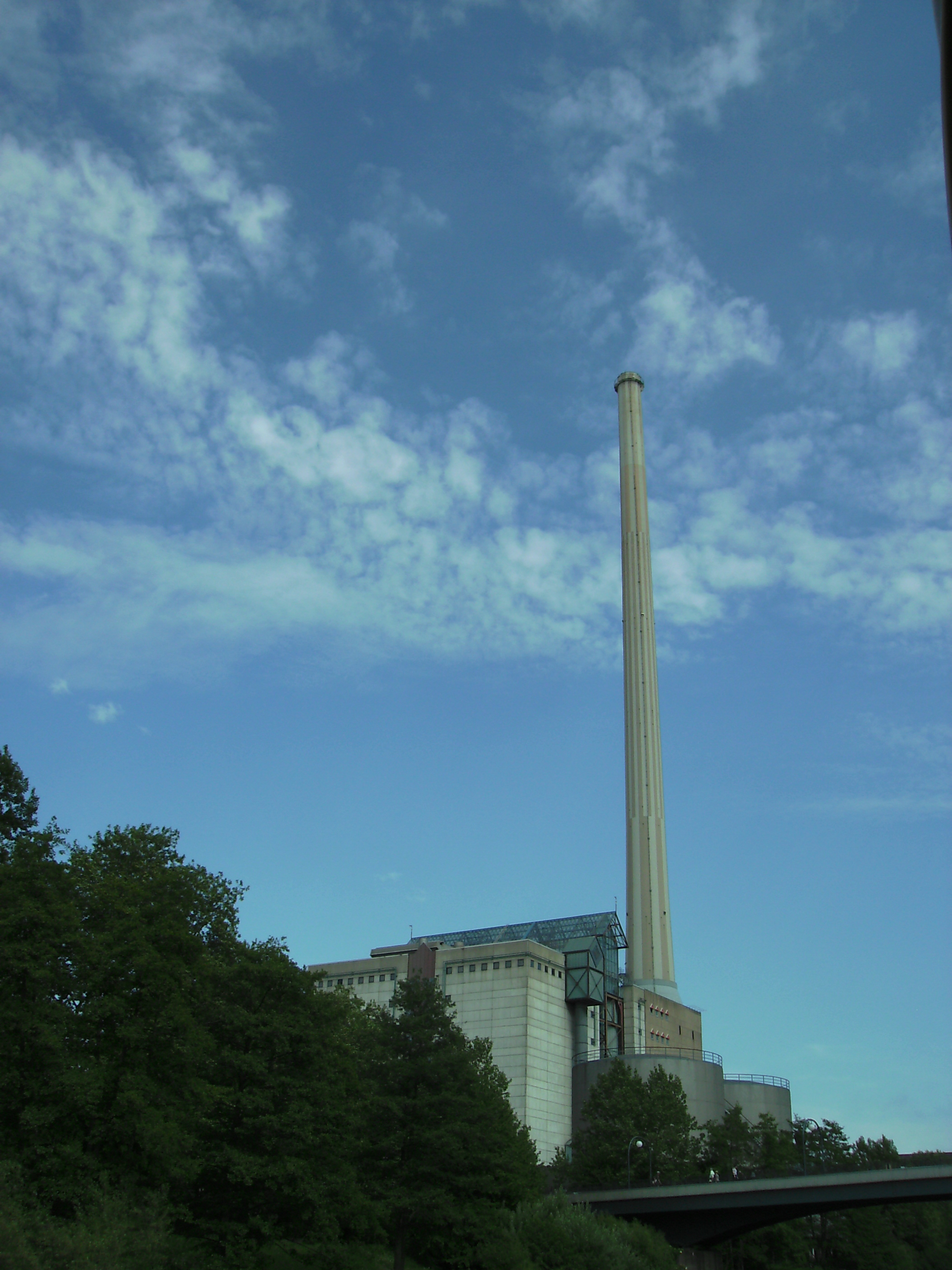 Saarbrücken: Kraftwerk Römerbrücke